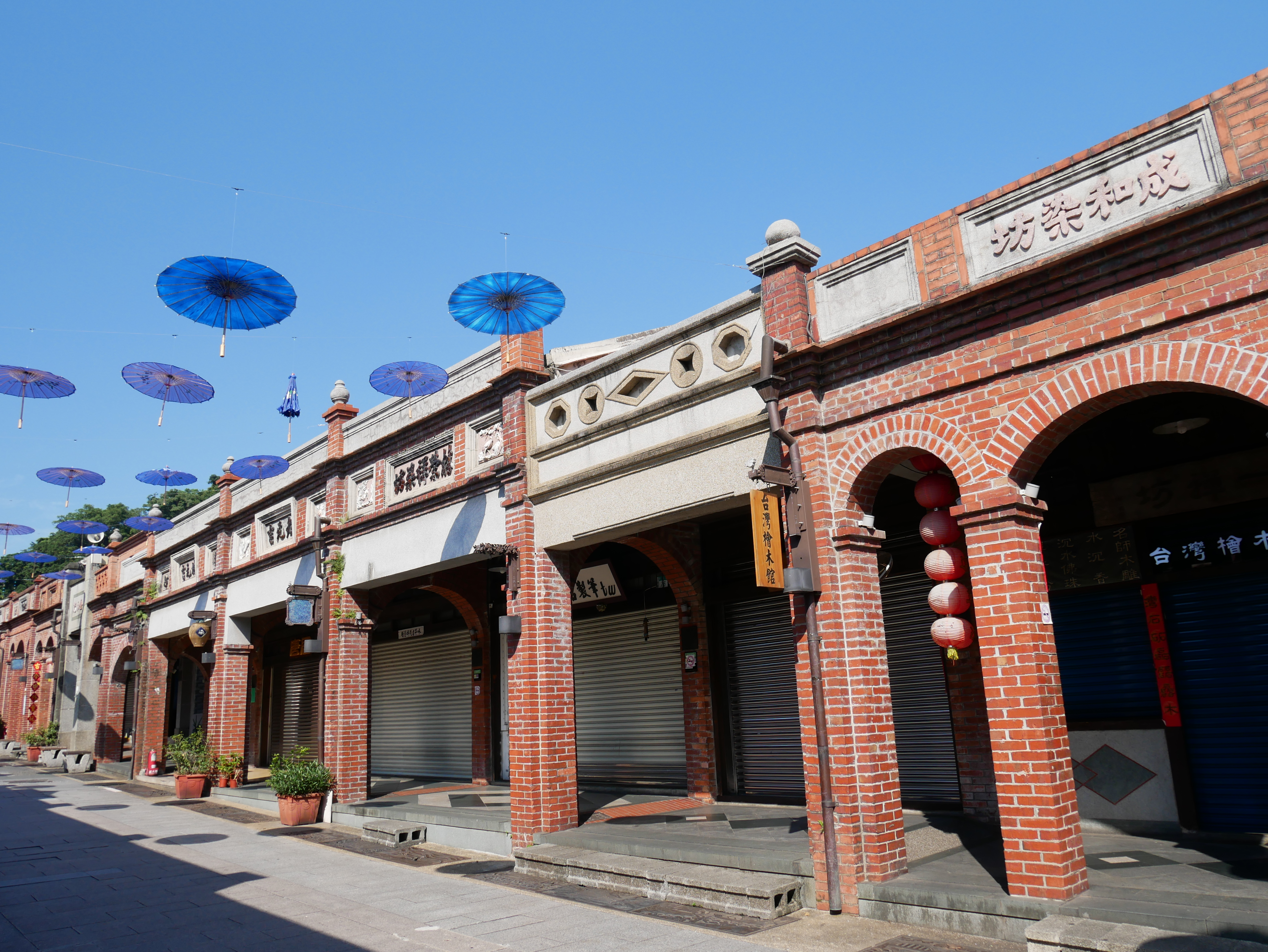 三峽老街林榮祥染坊、老元吉與林元吉附近，新北市三峽區三峽里